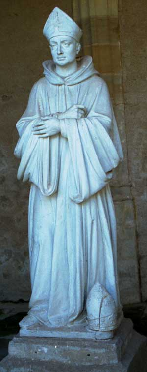 Statue de St Mayeul dans la galerie du cloître du prieuré Saint-Pierre-et-Saint-Paul de Souvigny (Allier). Source : .